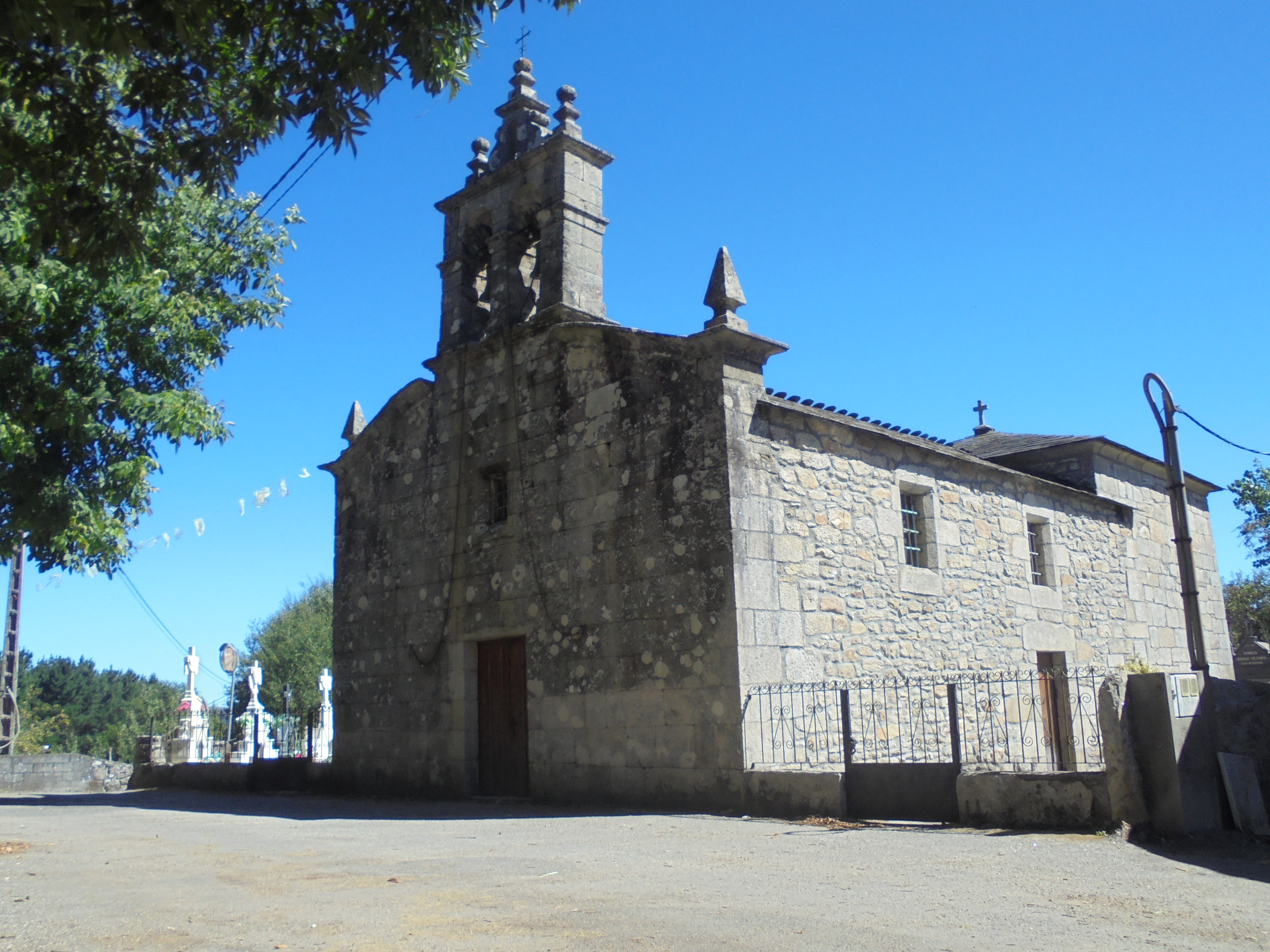 Igrexa parroquial de San Pedro de Mera ( Lugo)